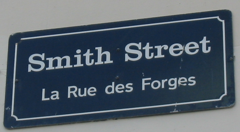 Smith St, Guernsey